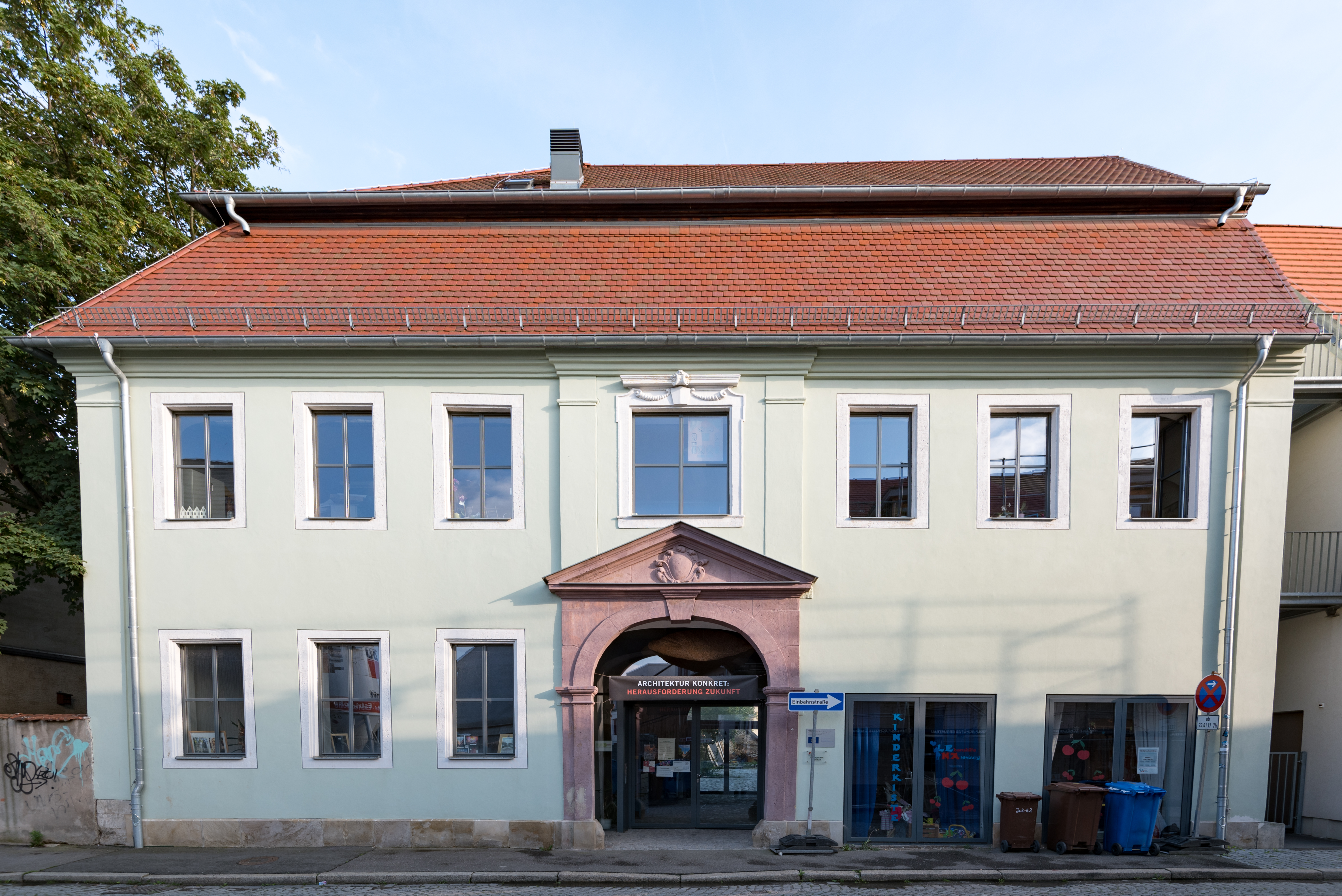 Naumburg (Saale), Wenzelsgasse 9